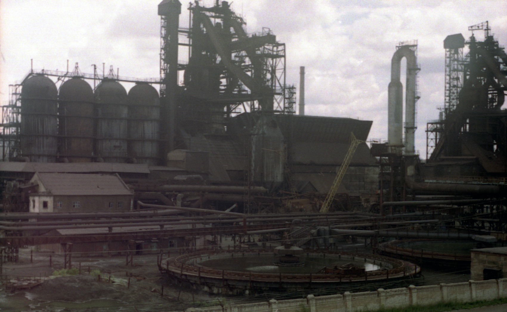 Доменна піч Краматорського металургійного заводу: Доменна піч Краматорського металургійного заводу